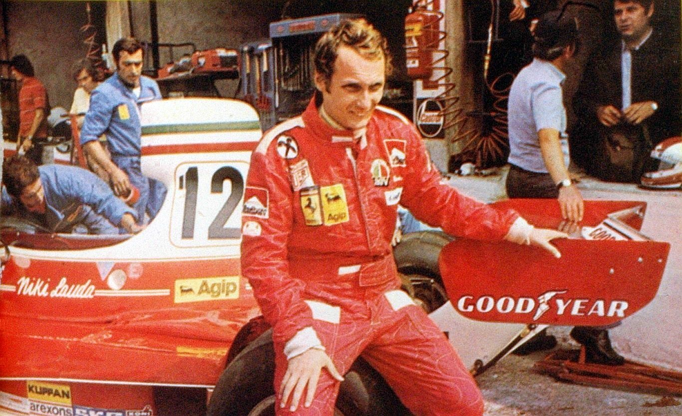 Niki Lauda, El Grafico del 10 de Septiembre de 1975. Edicion 2918